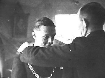 Collectie / Archief : Fotocollectie Anefo Reportage / Serie : [ onbekend ] Beschrijving : De nieuwe burgemeester van Holten Annotatie : [negatief ontbreekt]Betreft mr. Willem Henric Enklaar Datum : 13 maart 1946 Locatie : Holten Trefwoorden : burgemeesters Fotograaf : Hakeboom, Ab / Anefo Auteursrechthebbende : Nationaal Archief Materiaalsoort : Glasnegatief Nummer archiefinventaris : bekijk toegang 2.24.01.09 Bestanddeelnummer : 901-5640